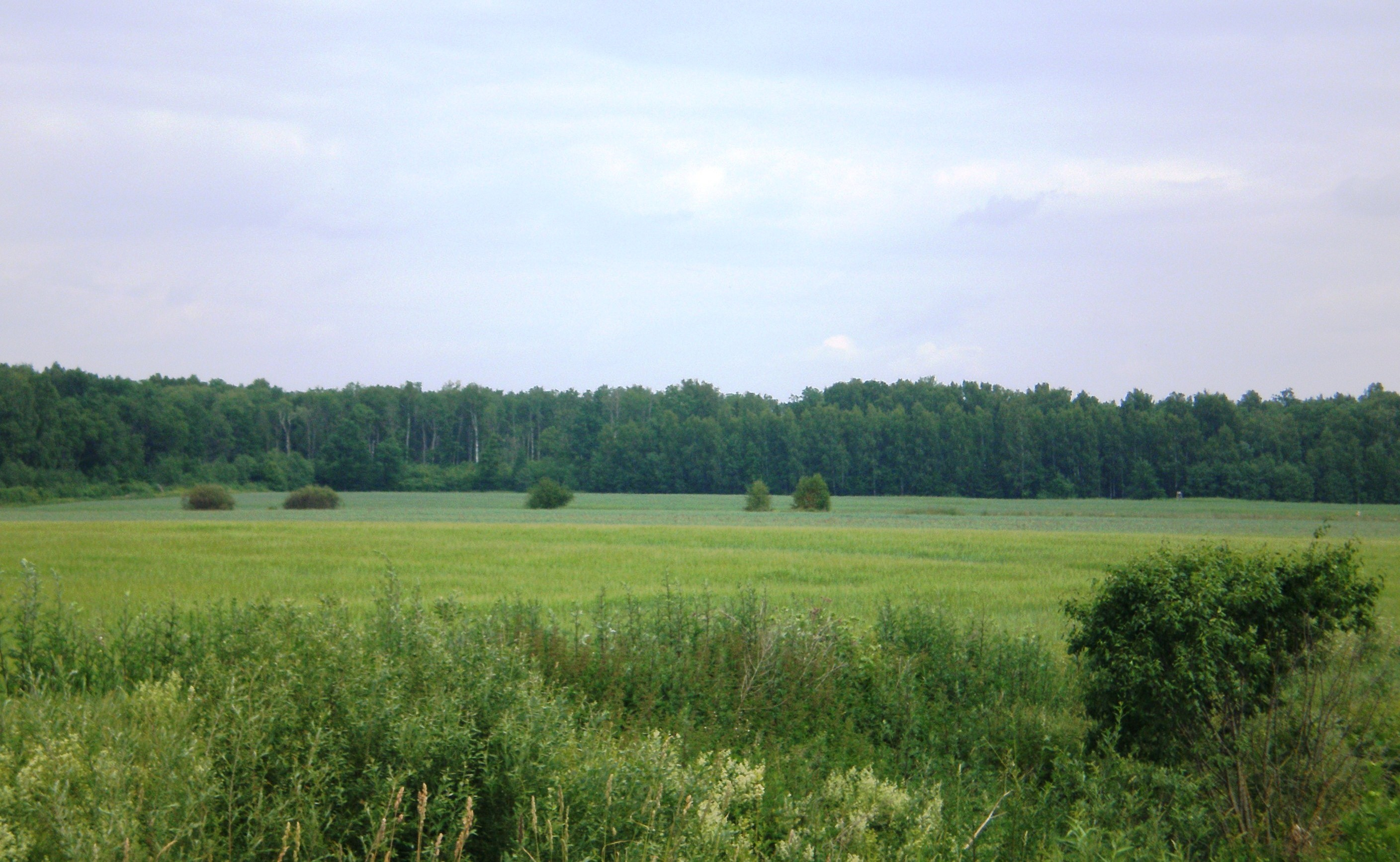 Skilvionių miškas ties Skirpija, Panevėžio raj.